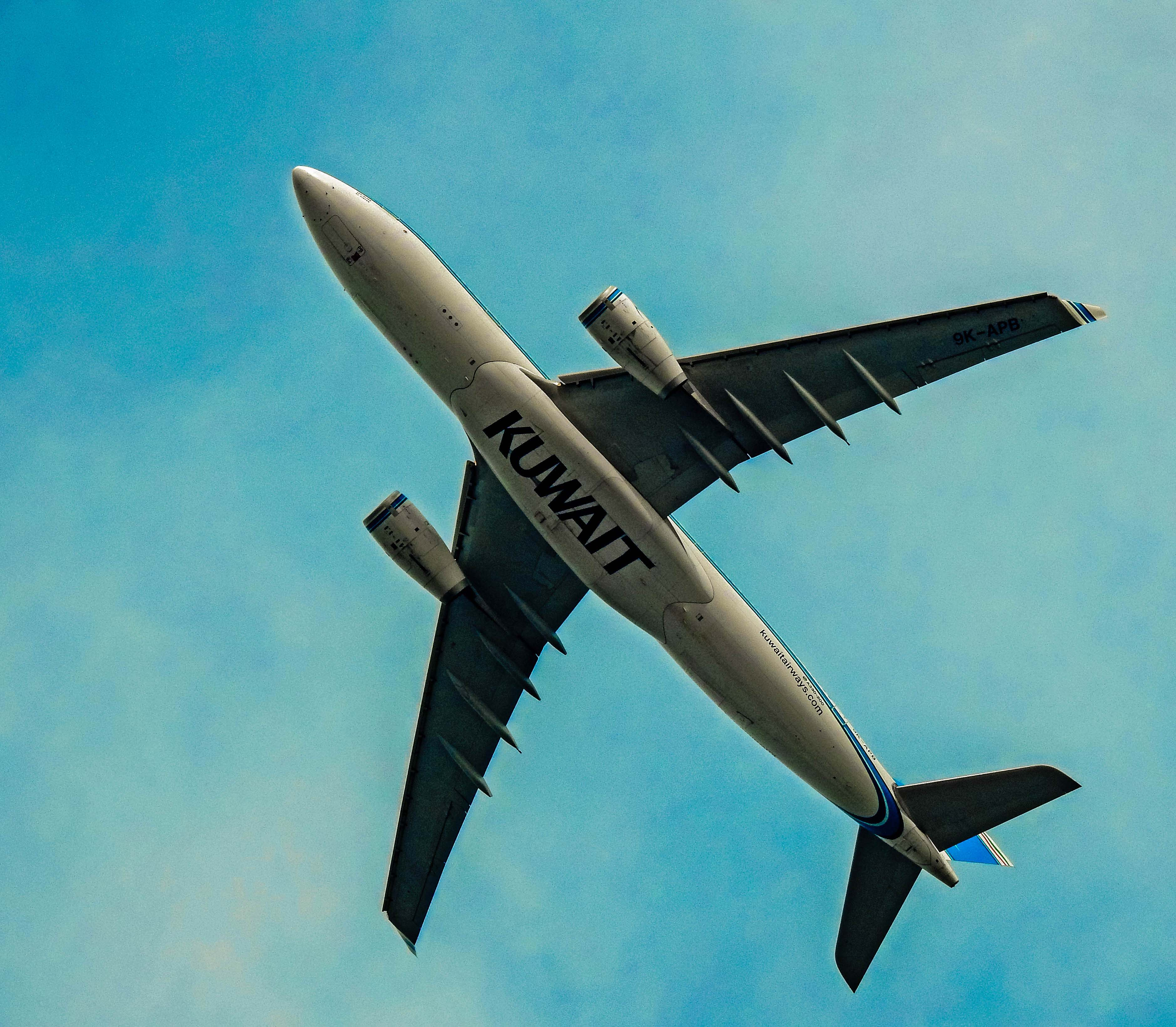 കുവൈറ്റ് എയർവെയ്സ് വിമാനം കുവൈറ്റിൽ നിന്നും ഇർവിൻ കാലിക്കറ്റ് പകർത്തിയത്